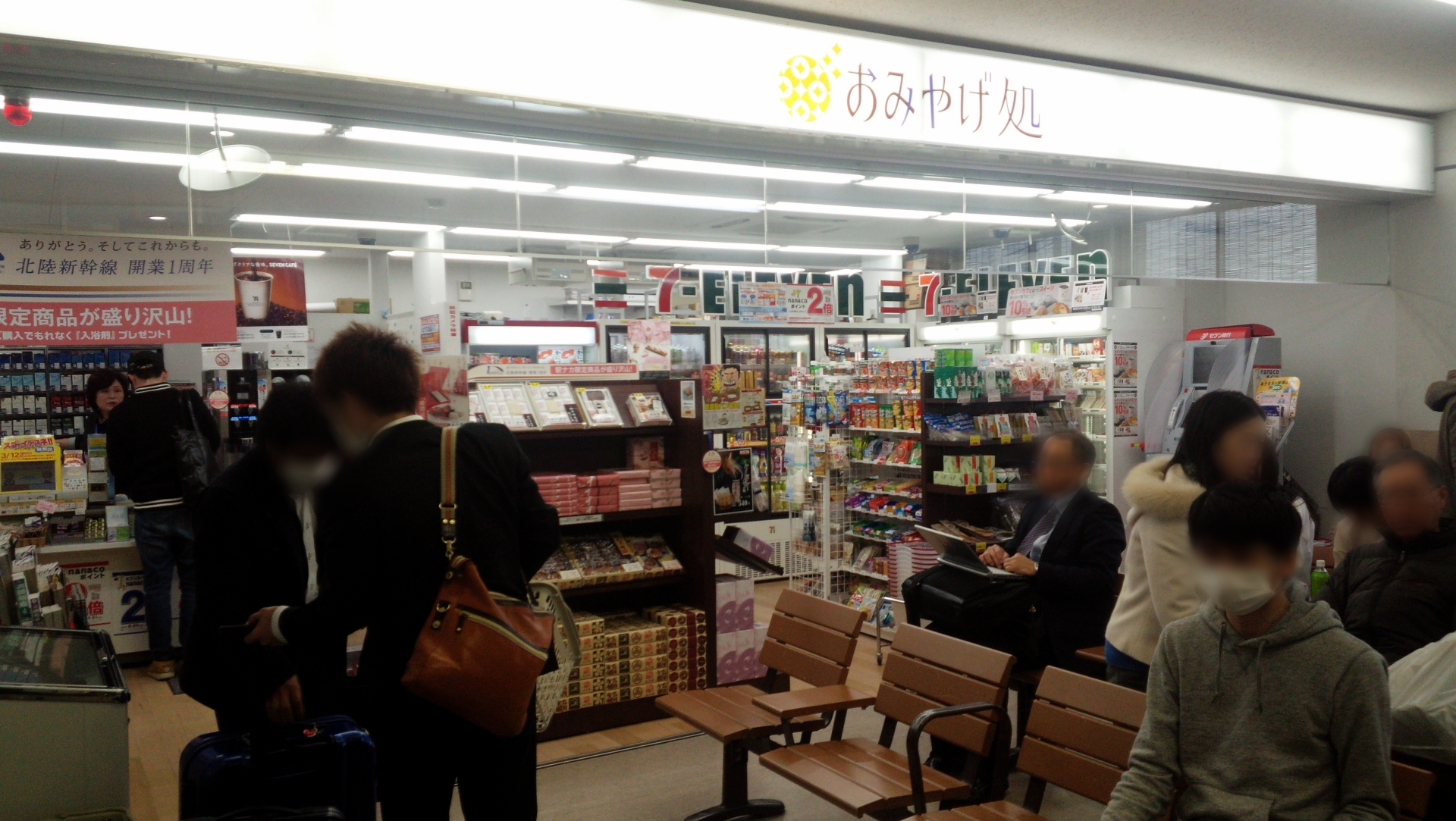 セブンイレブンおみやげ処芦原